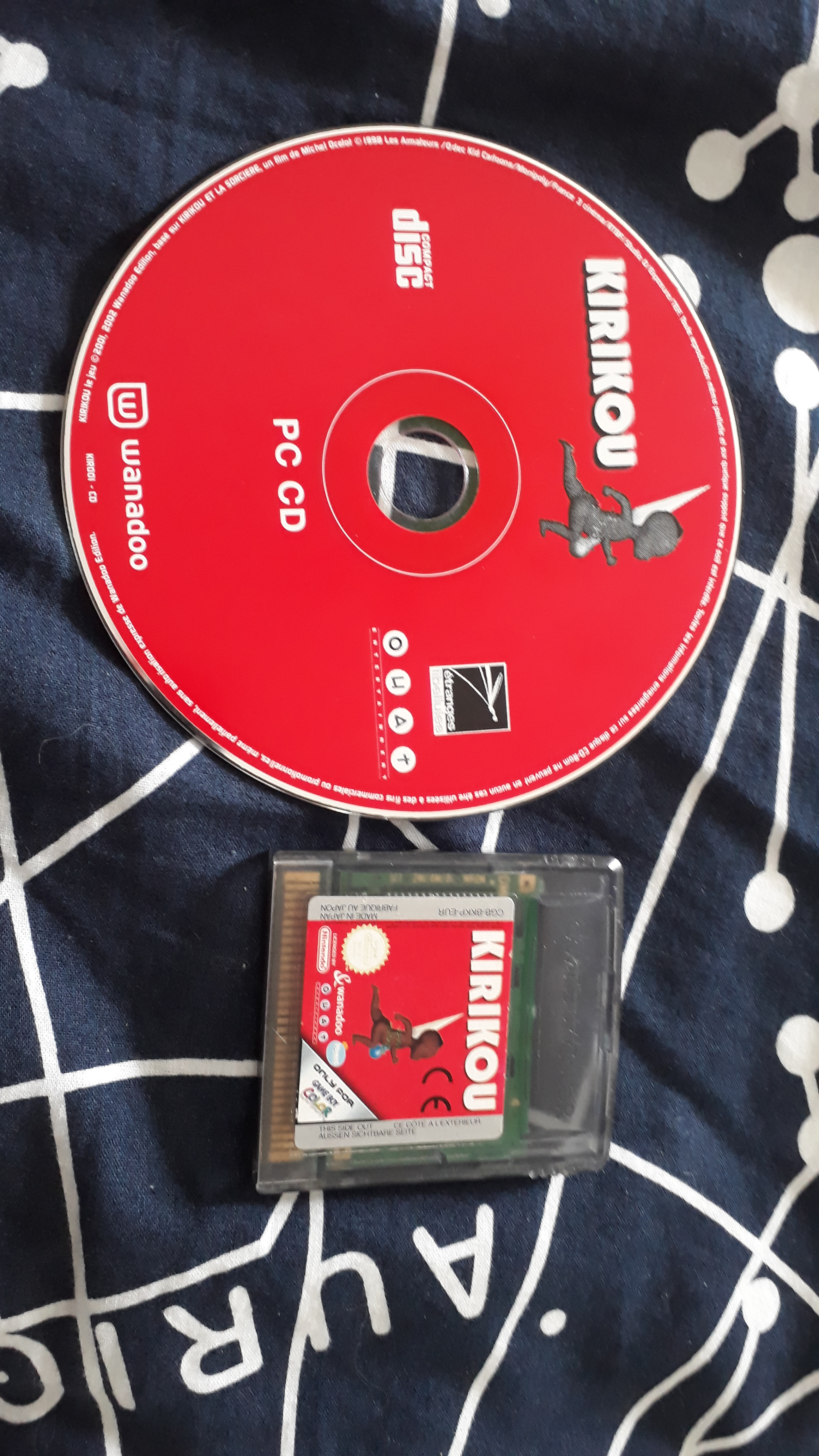 Photo du CD-Rom du jeu PC et de la cartouche GBC